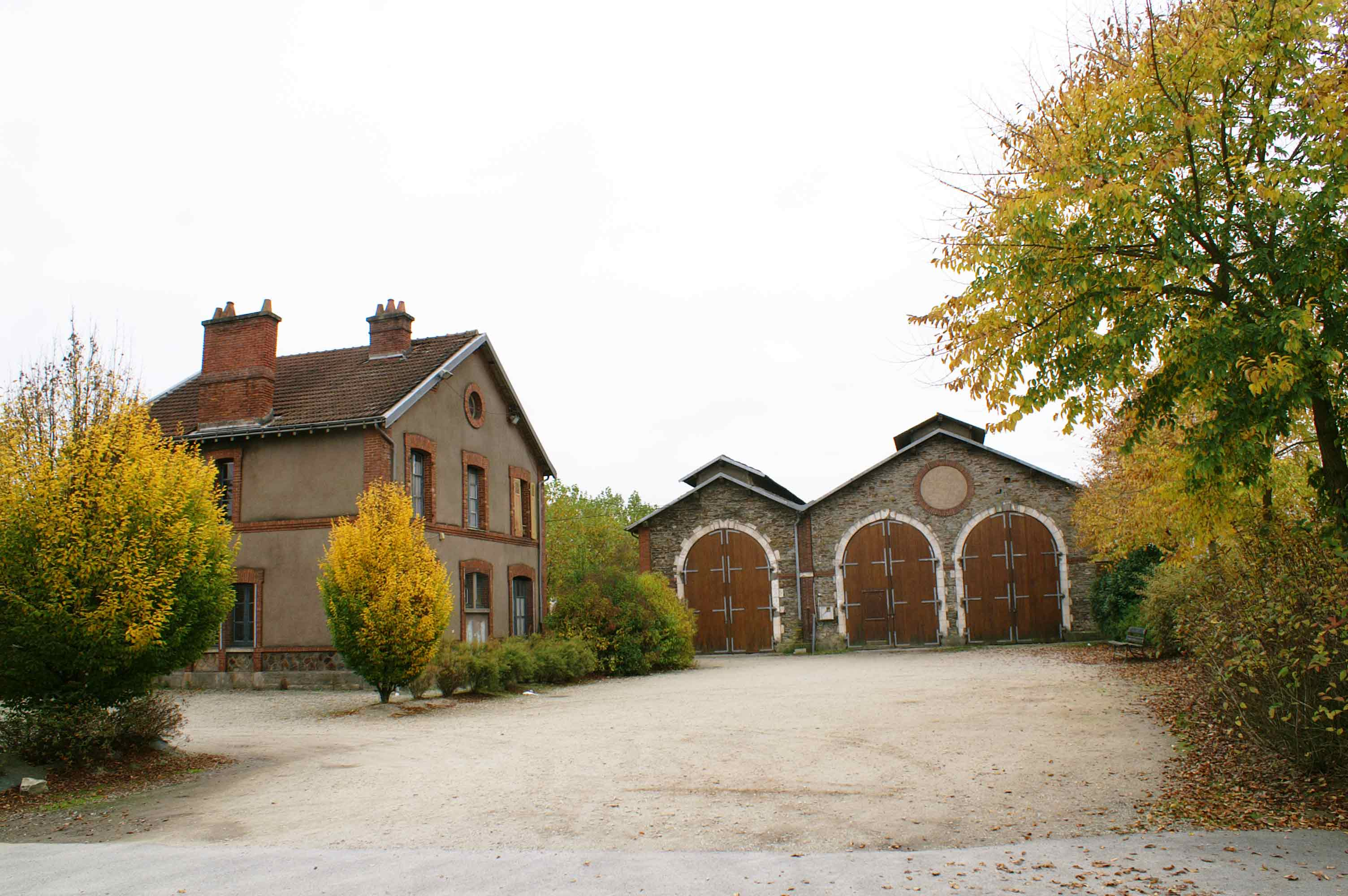 Gare de Ploërmel divers bâtiments, dont le dépôt des locomotives.